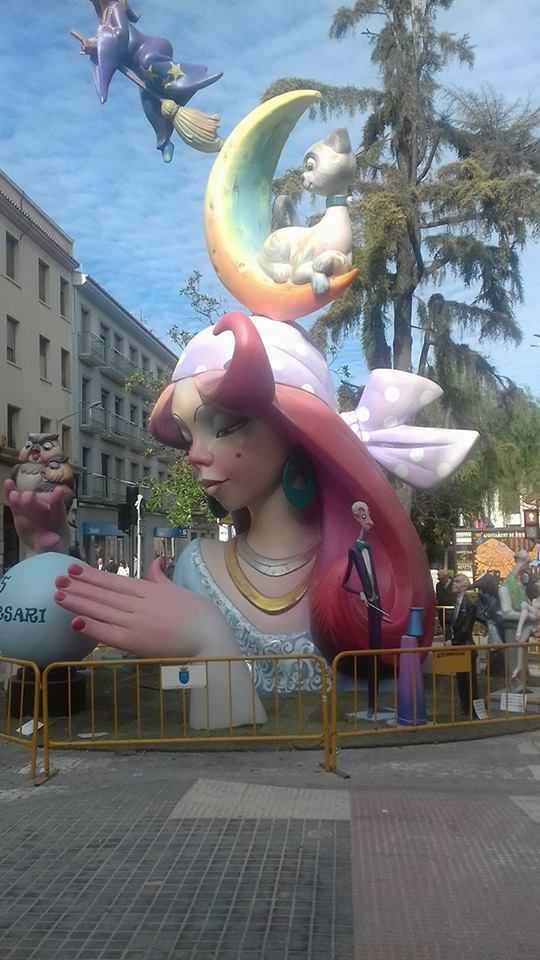 Falles de Borriana, 2017. This is a photography of a Folklore festival in Spain (Wikidata id Q23663119).